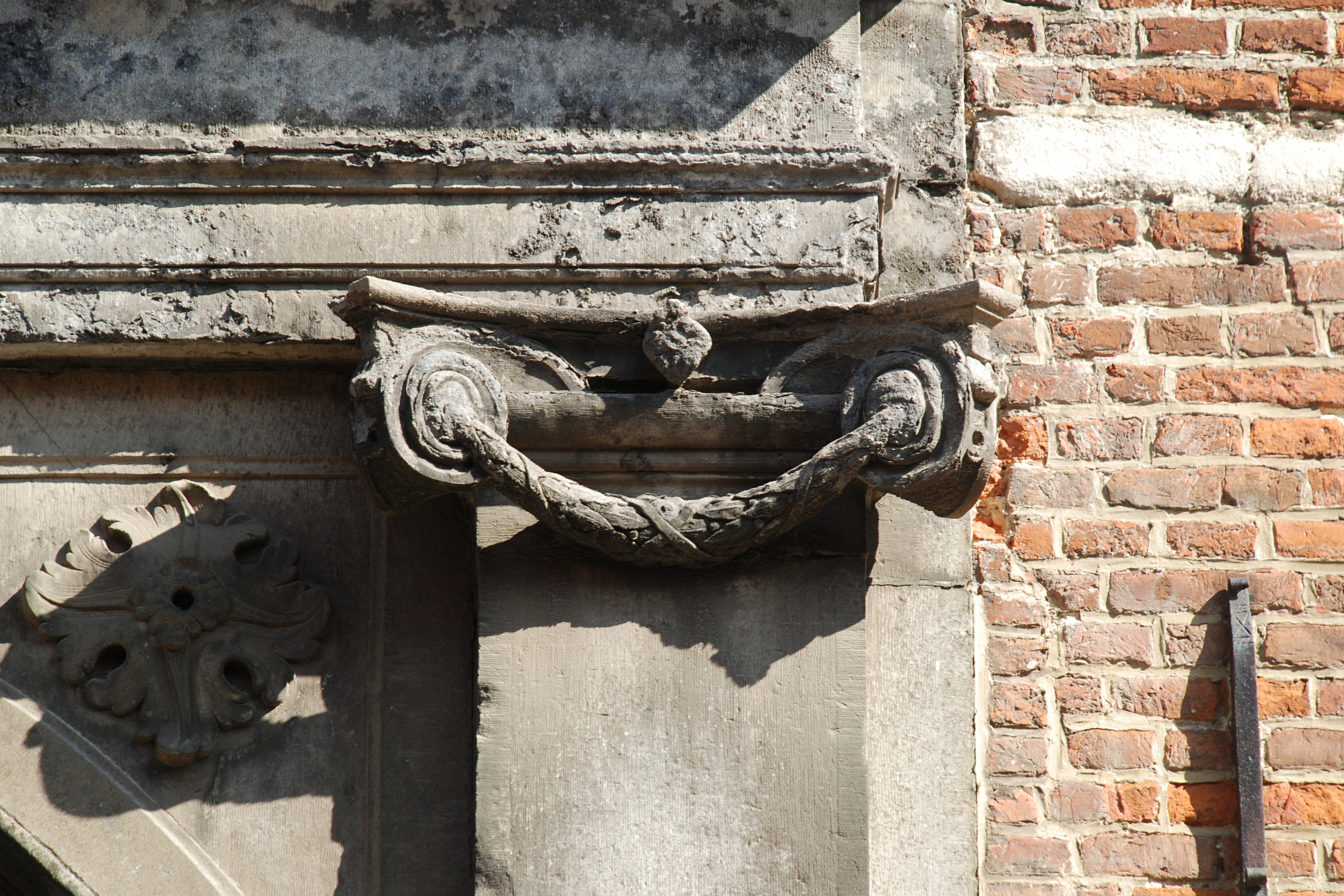 Belgique - Louvain - Jardin botanique (Kruidtuin) - portail néo-classique de l'ancien jardin botanique (architecte Laurent-Benoît Dewez -1771)